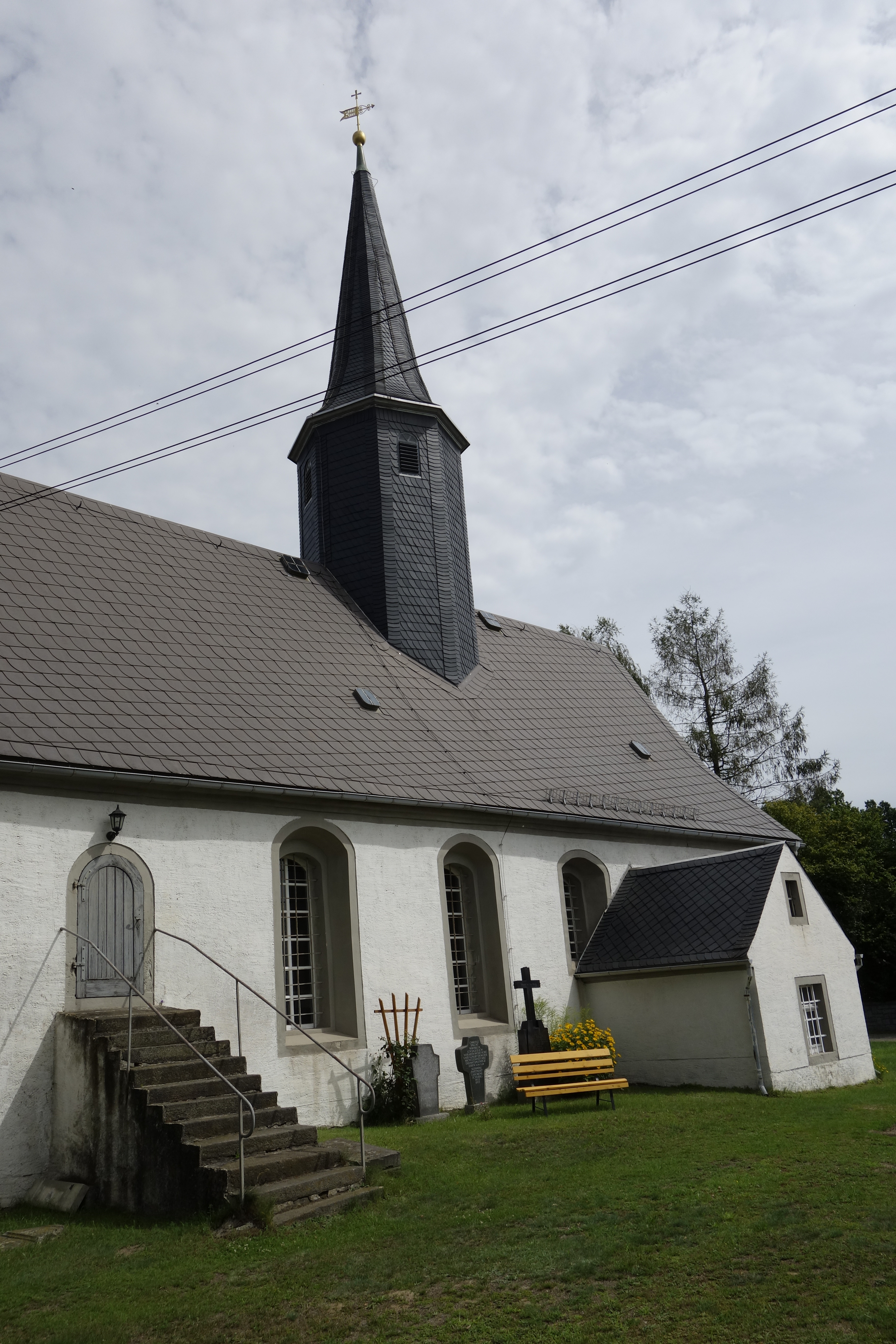 Kirche Höckendorf Juli 2017 (3)